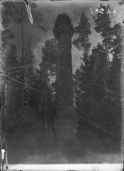 Беларуская (тарашкевіца): Лявонпаль (Lavonpal), калёна ў гонар Канстытуцыі 3 траўня